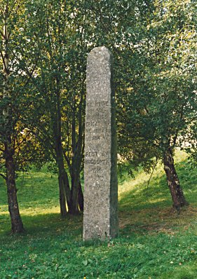 Minnestein reist i 1914 ved Solvorn skule med innhogne namn på alle frå Solvorn sokn som fall i ufredsåra 1808-1814